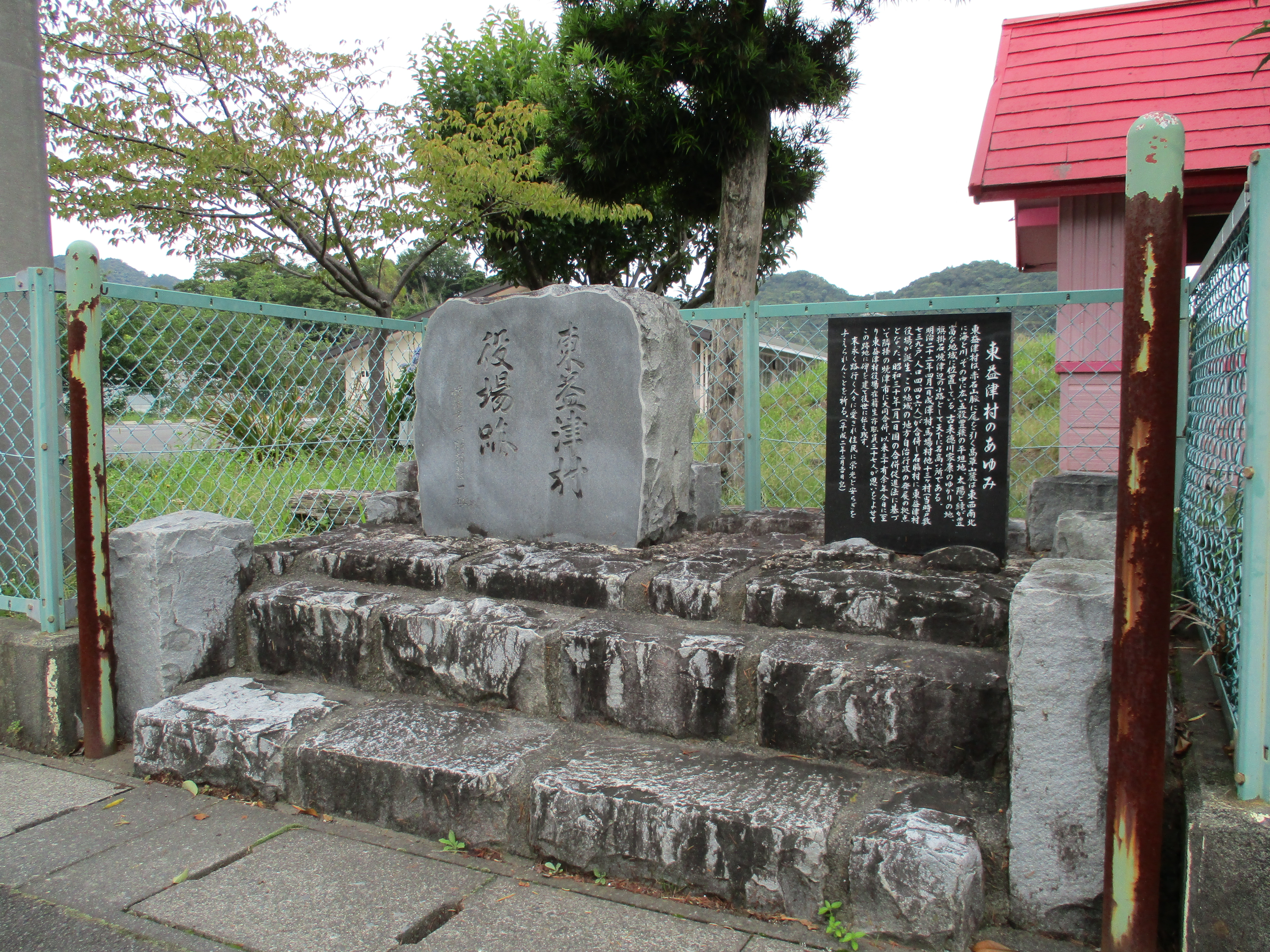 静岡県焼津市の東益津村役場跡の石碑